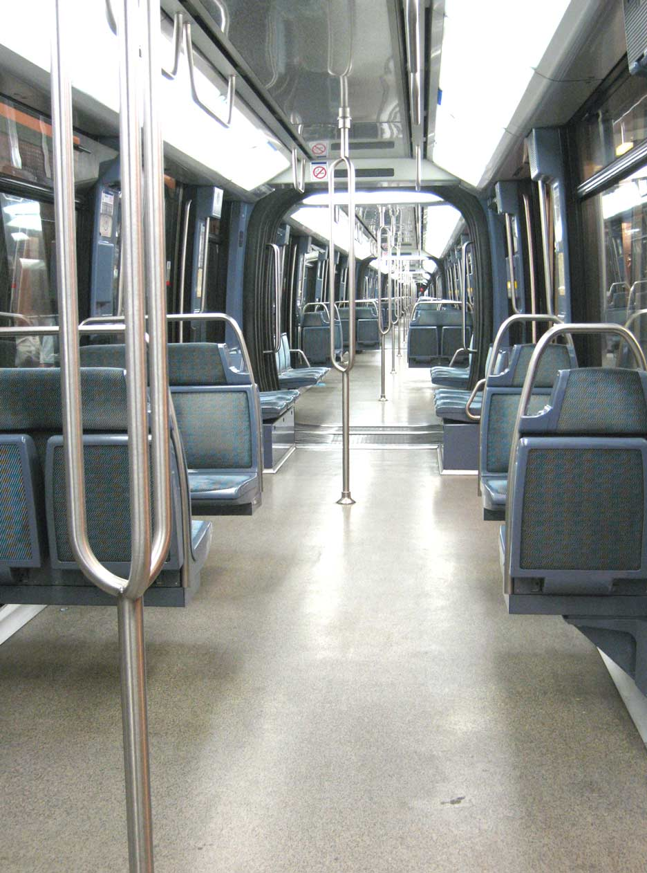 Metro de Paris Rame de la série MP89 interieur ligne 14 Lieu : Paris, France Date : Juin 2006 Auteur : Pline photo personnelle